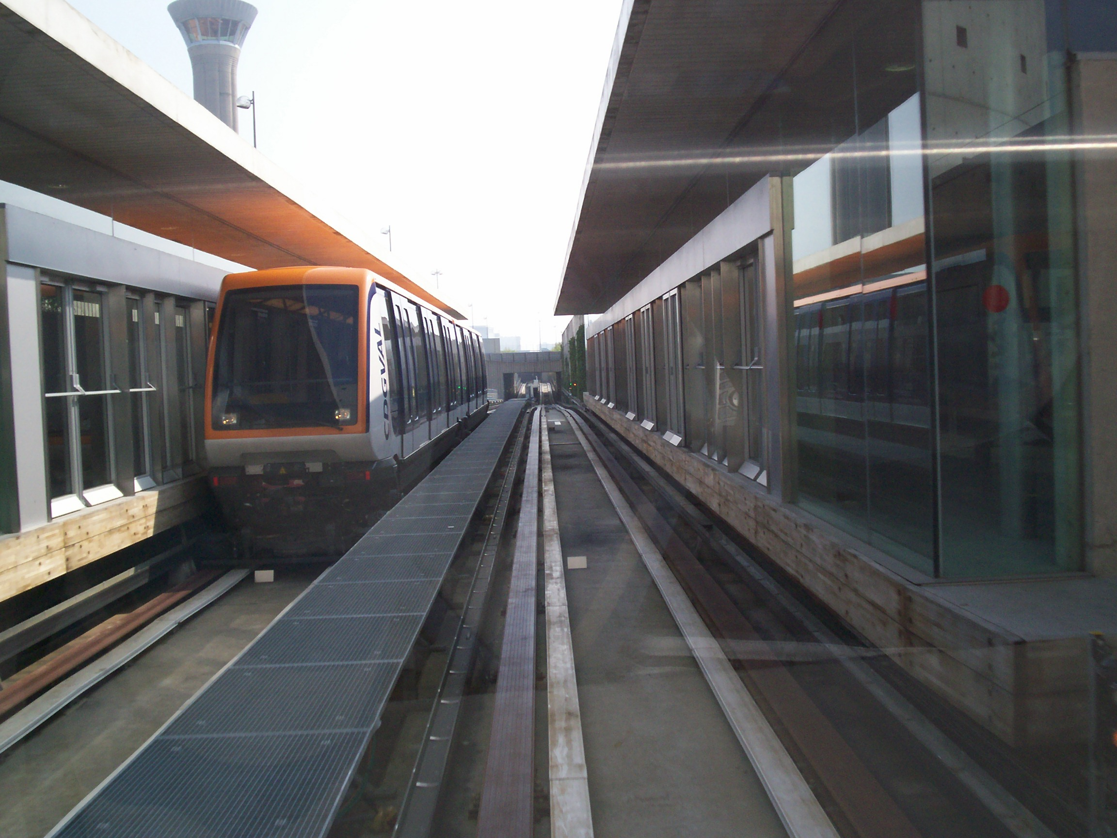 Vue depuis une rame d'une autre à l'arrêt, en station de Parc PR, qui est en direction du terminal 1